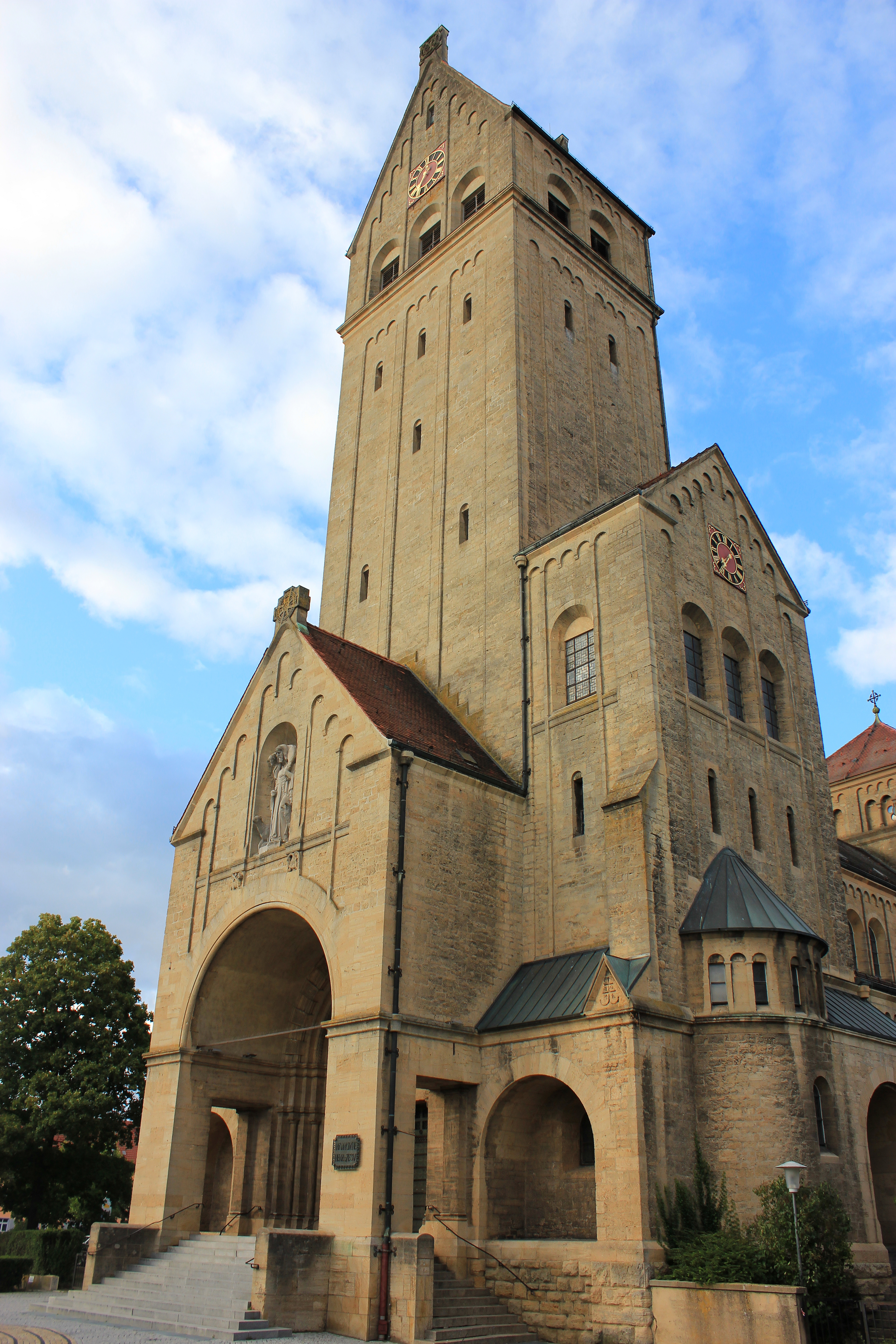 Herz-Jesu-Kirche in Singen (Hohentwiel), Deutschland.